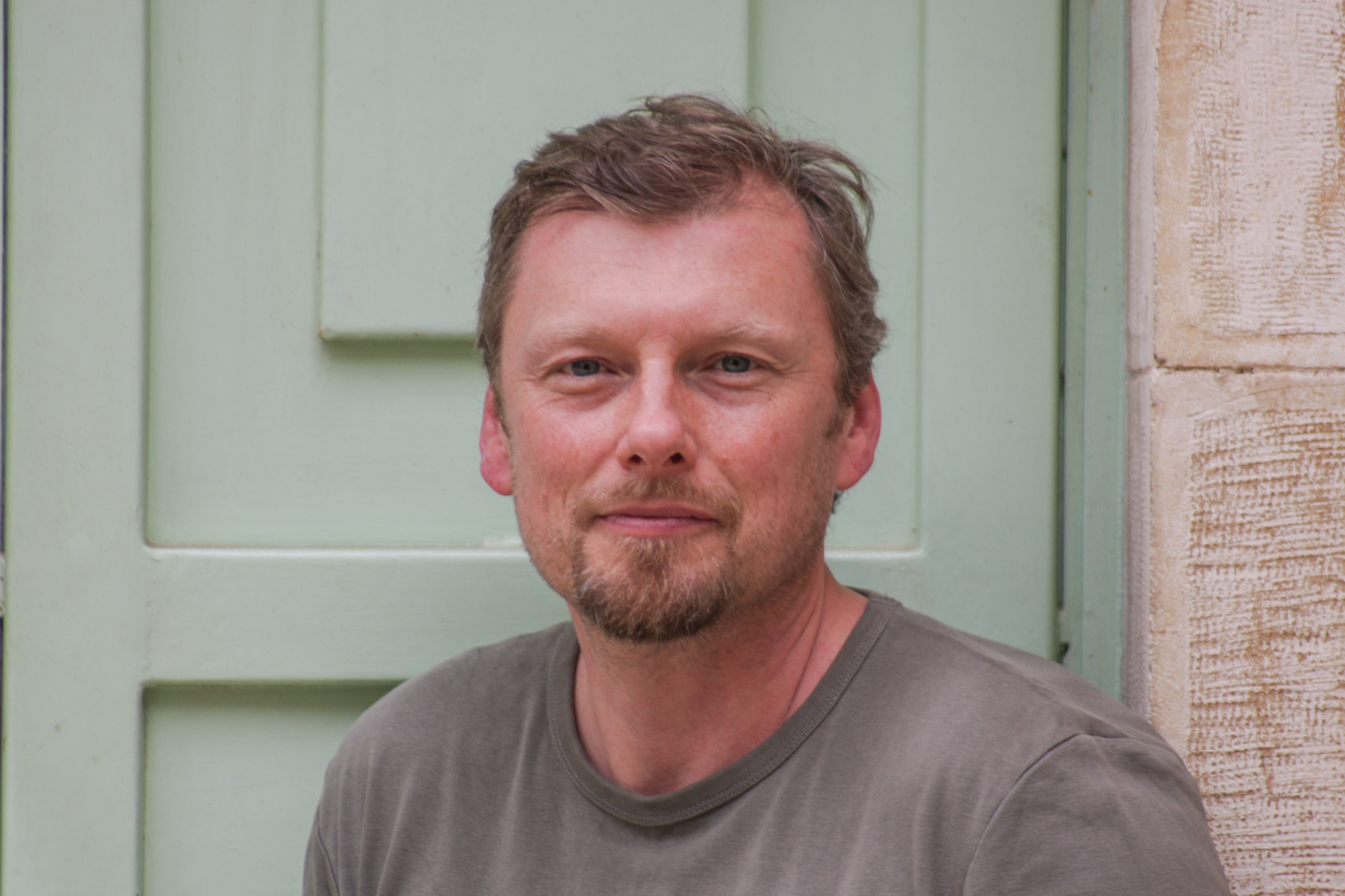 Albert Frey 2008 in Israel